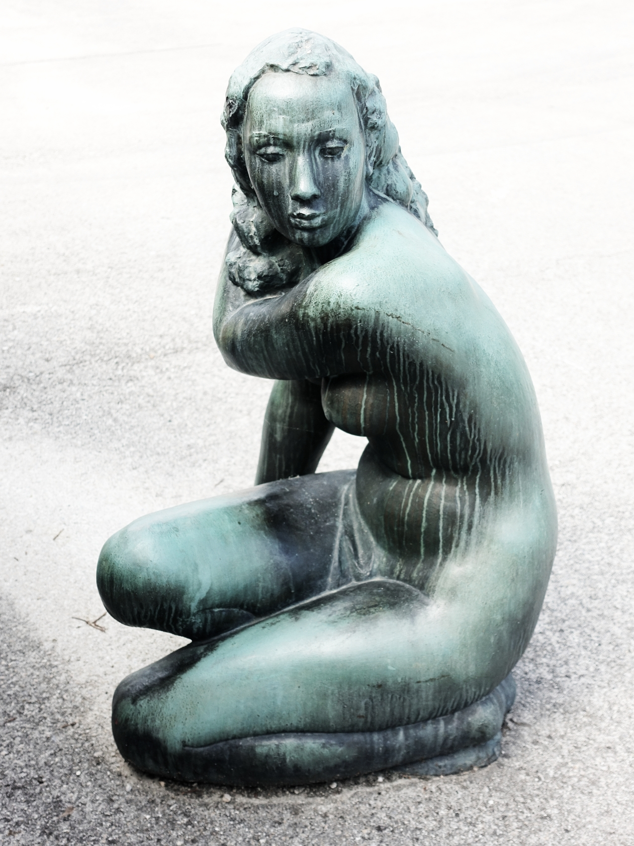 Skulptur Aurora, 1937 von Max Reinhold Weber (1897–1982), Rheinfelden Bildhauer, Maler, Zeichner Skulptur Aurora, Plakat, Foto Nr. 94